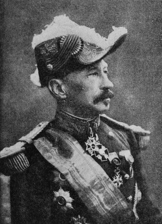 "Le Général André, Ministre de la Guerre 1900-1904."